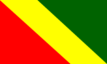 Bandera del cantón El Pangui